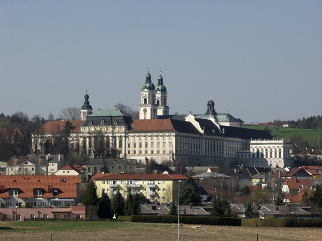 Stift Sankt Florian bei Linz, Fotografiert am 1. April 2005 von Süden her.